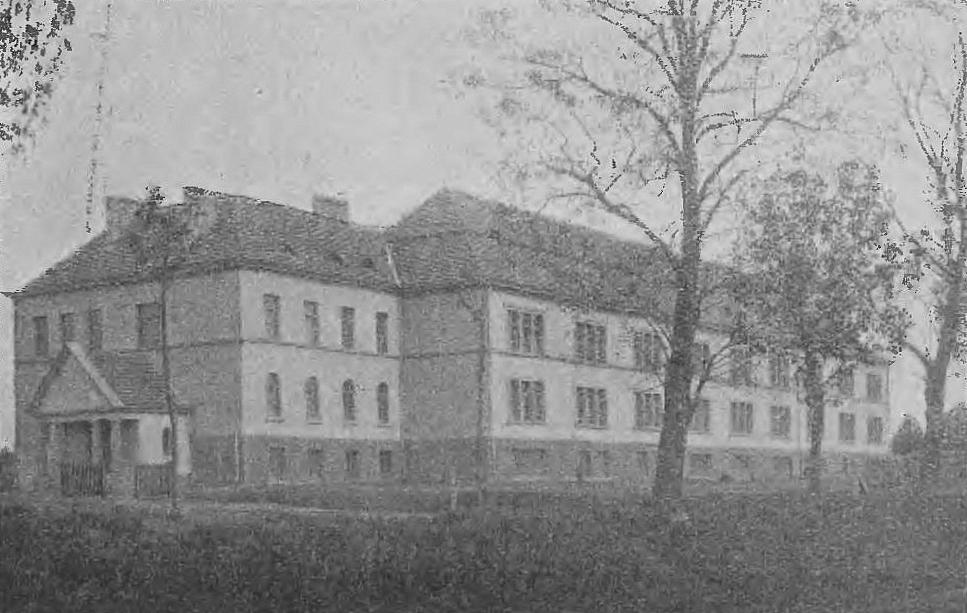 Koszary saperów w Sandomierzu (-1933)